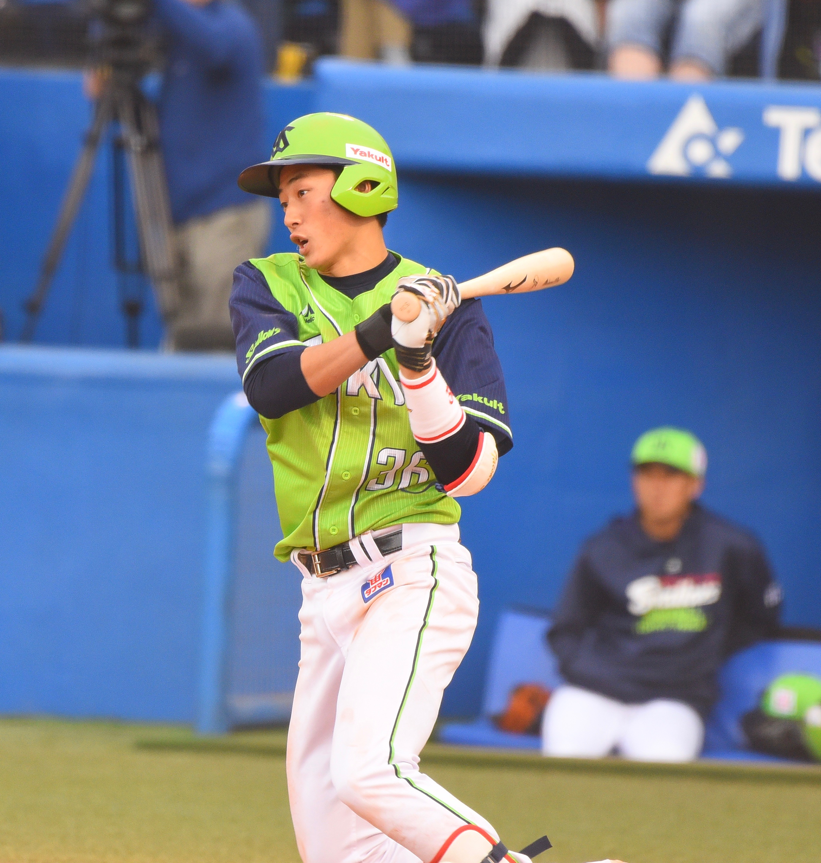 東京ヤクルトスワローズ 廣岡大志 2018年4月7日 神宮球場